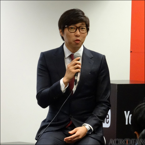 대도서관 & 씬님 & 소프 유튜브 크리에이터 패널 토의